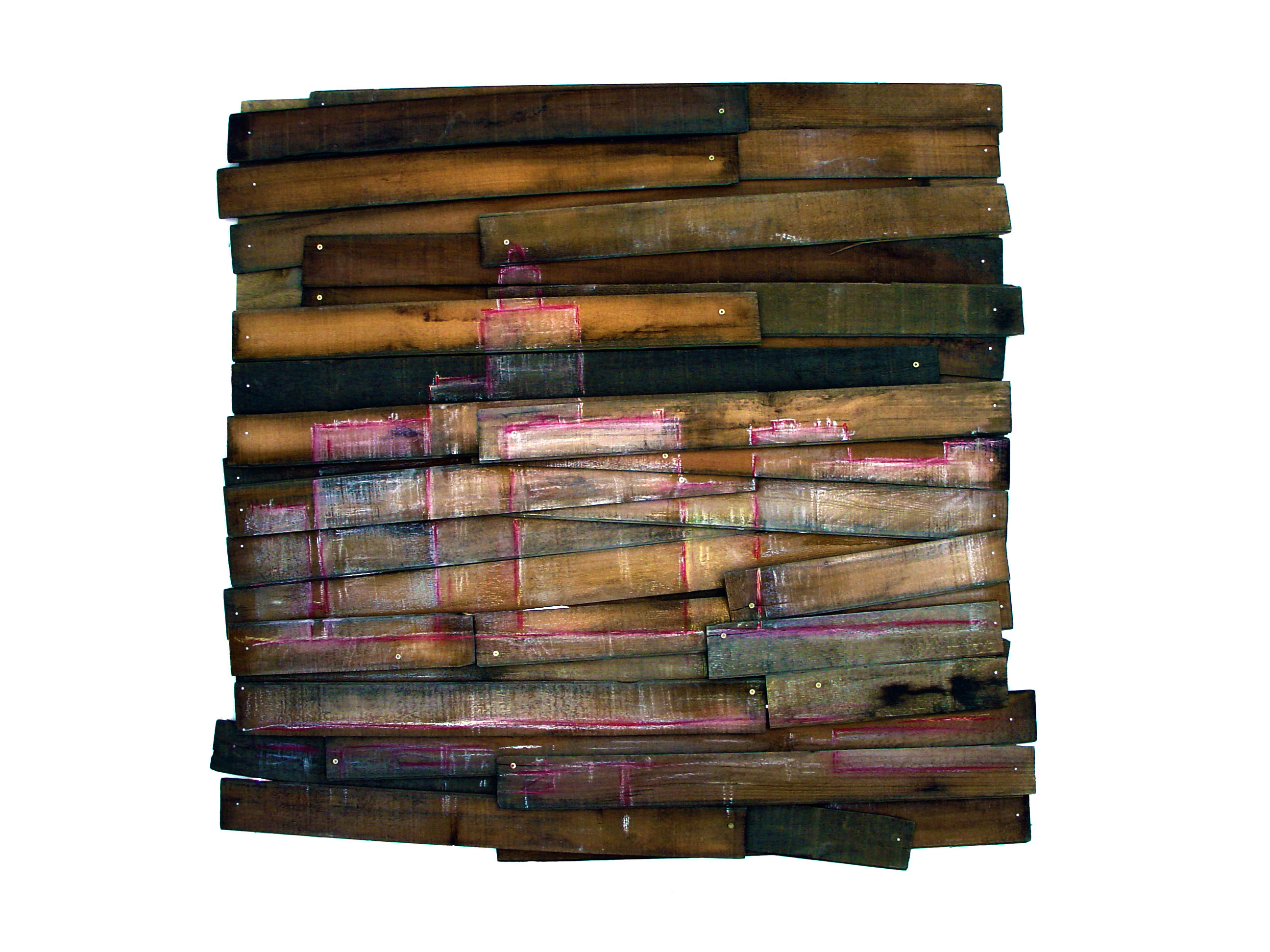 최재훈 창문을막고 꿈을깨다 목재에 드로잉 창문에 설치 2003